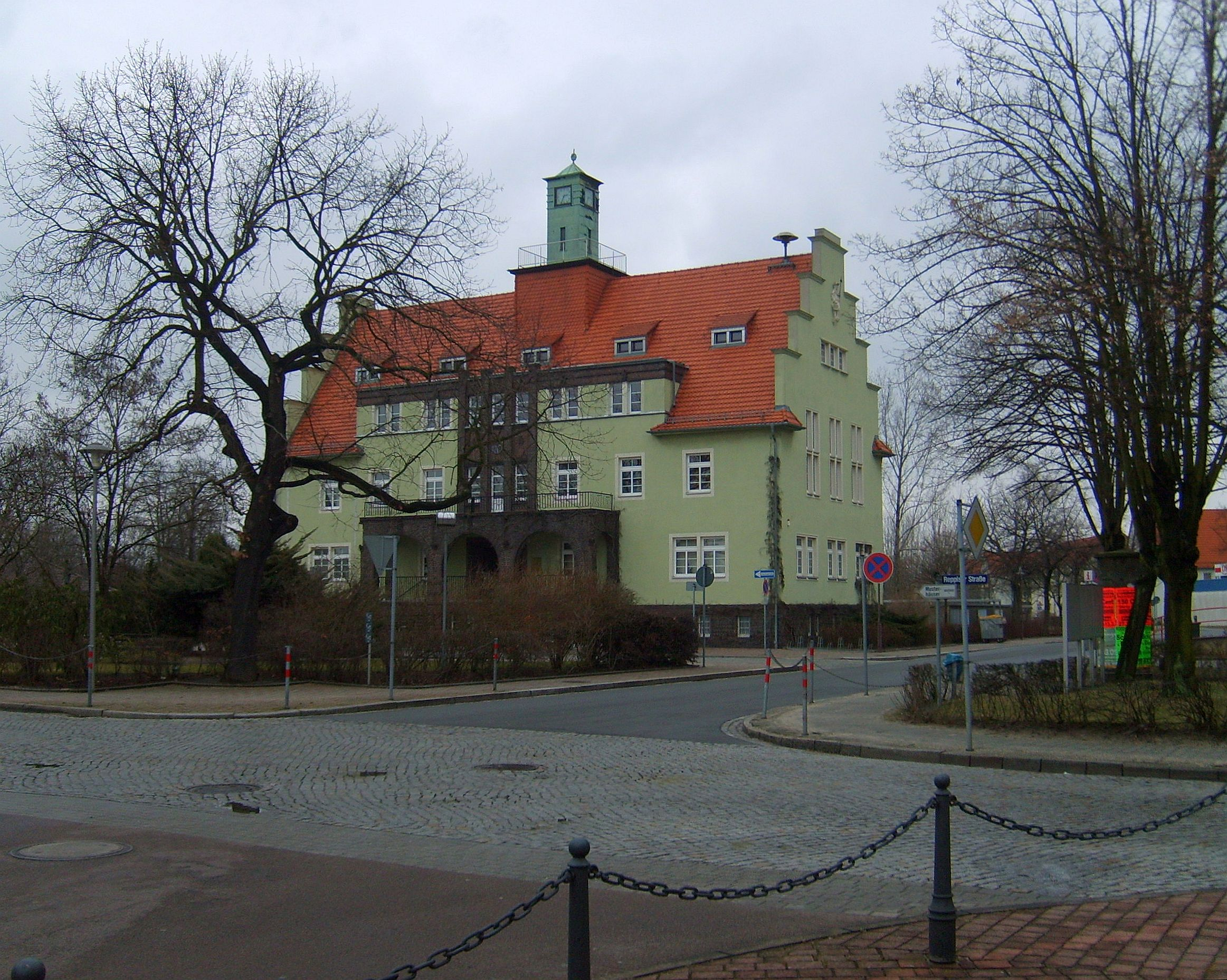 Gröditz.